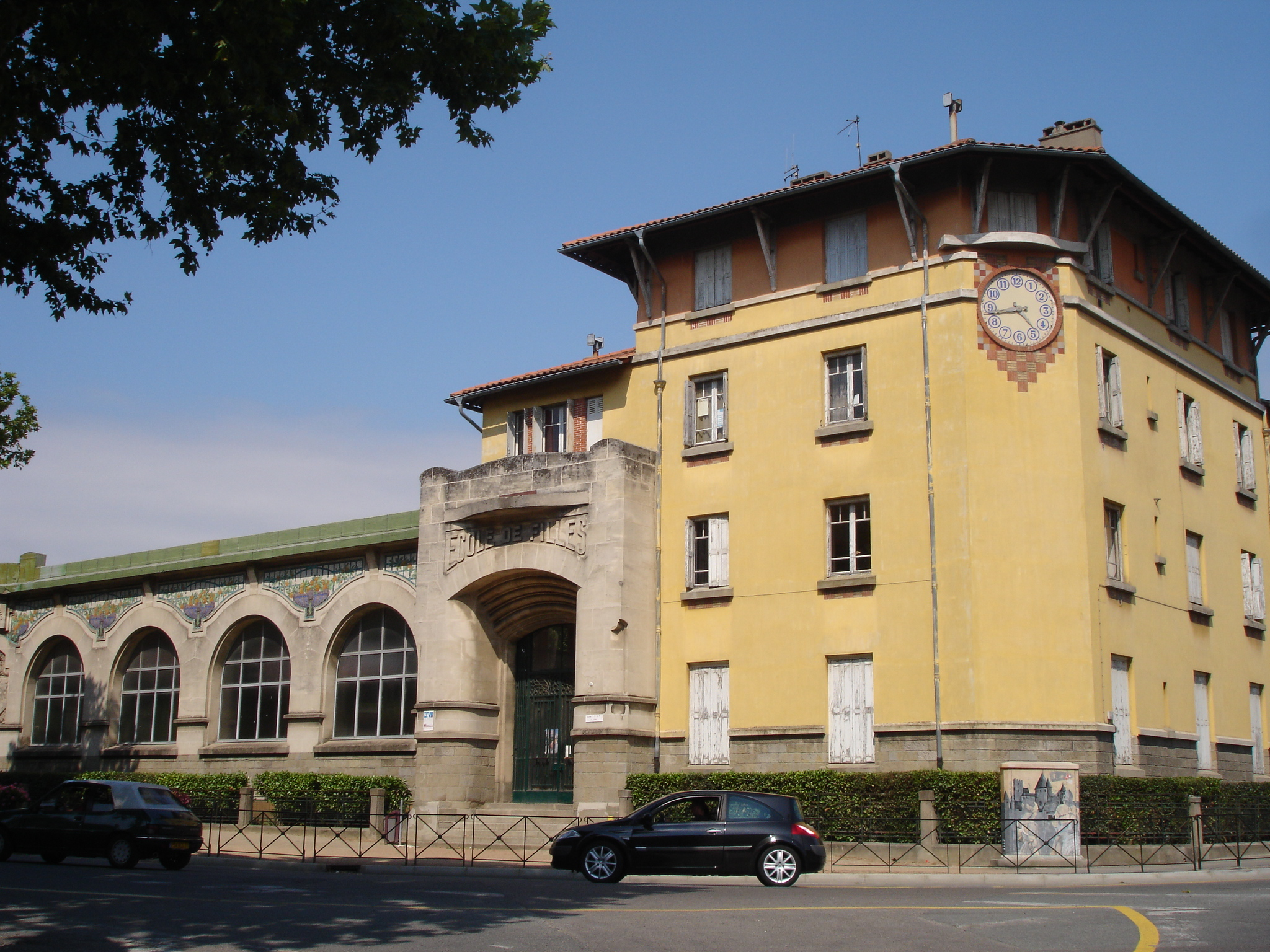 france, Aude (11), Carcassonne, école